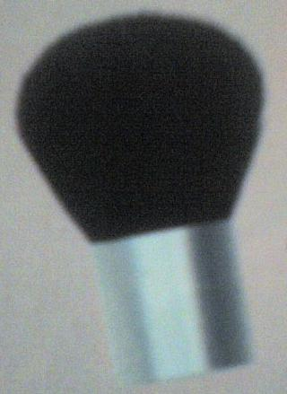 Brocha Kabuki de maquillaje